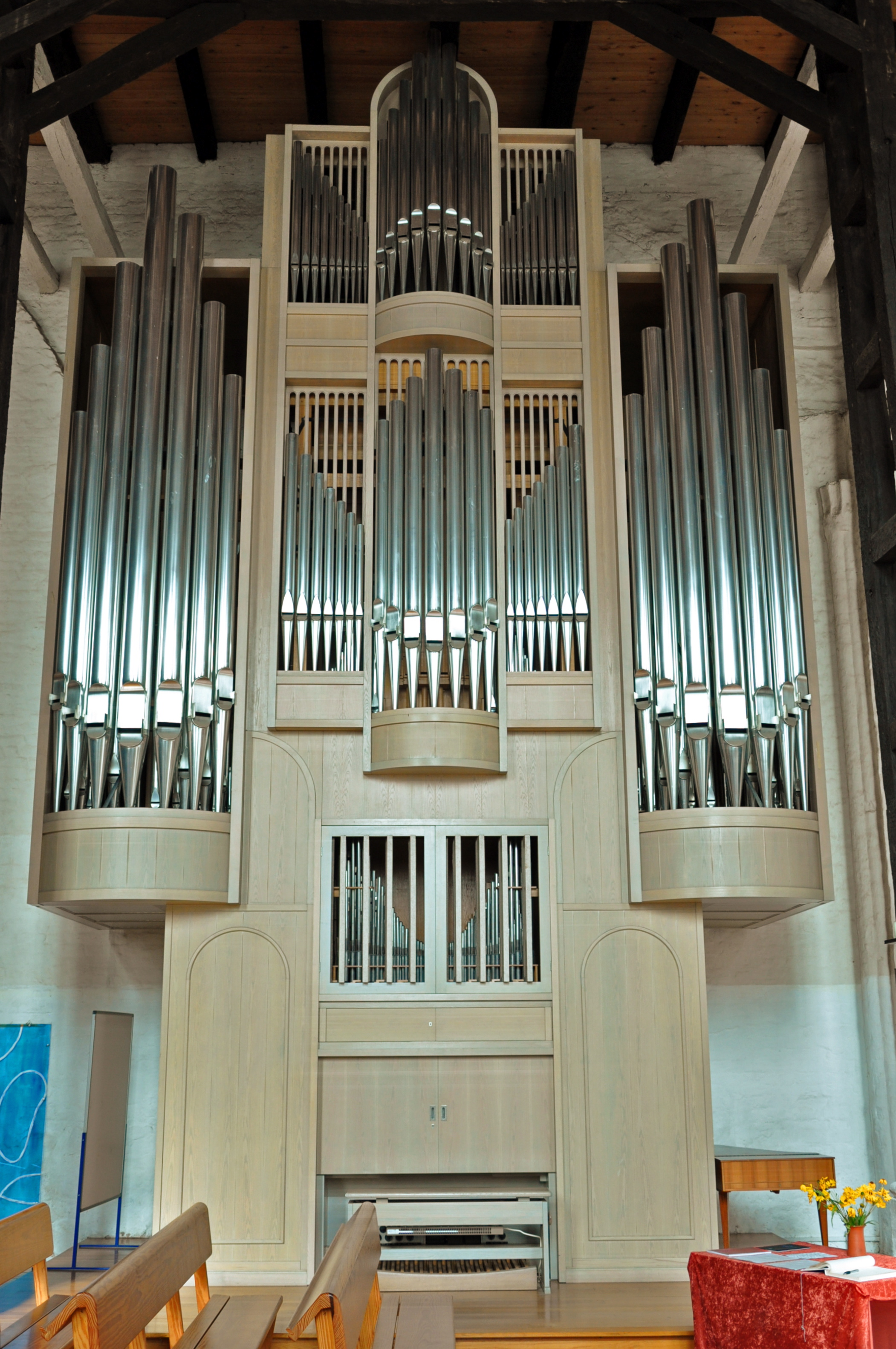 Orgel der Marienkirche Ribnitz, Mecklenburg-Vorpommern